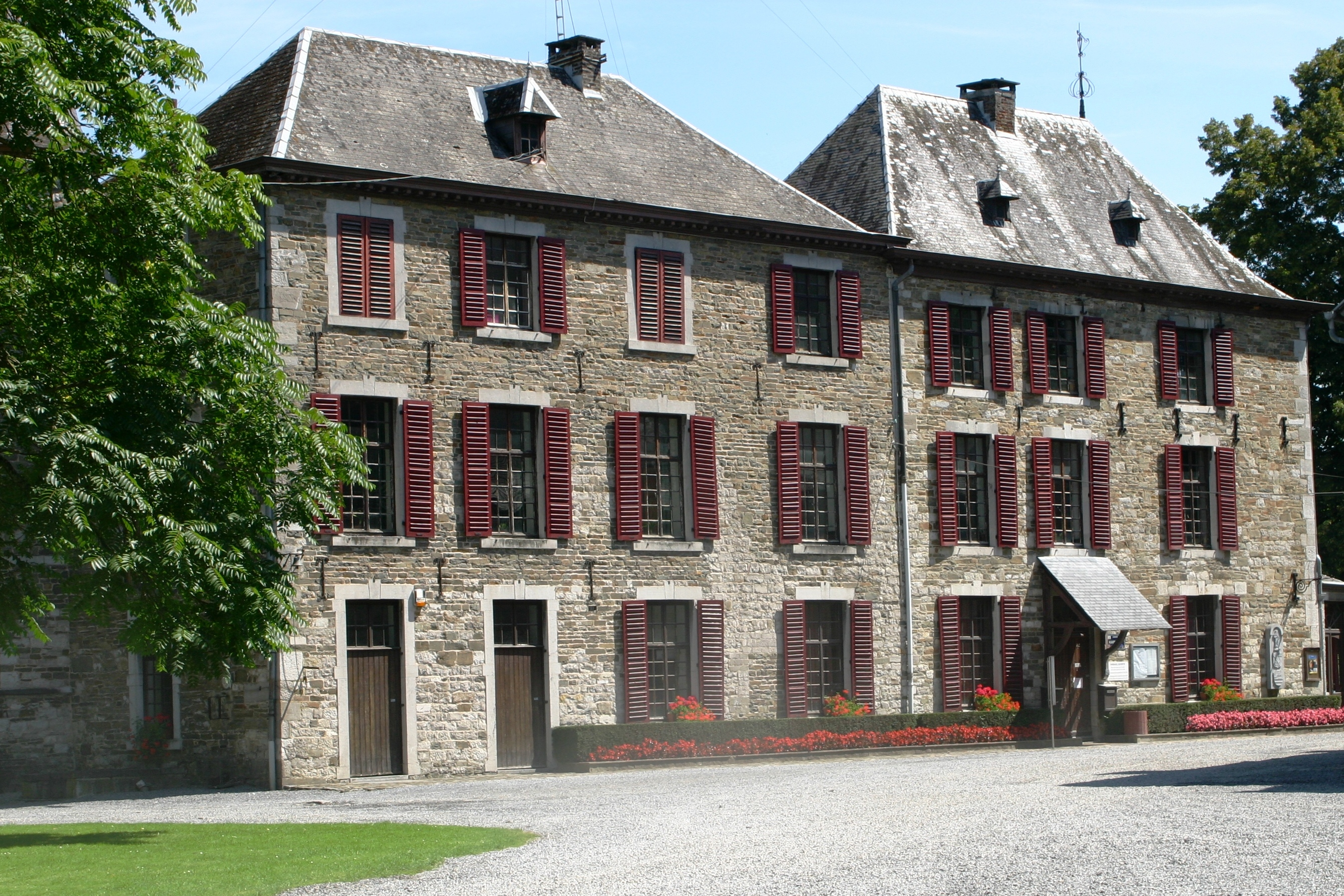 D'Gemeng vun Hamoir. Kategorie:Gebaier an der Provënz Léck Hamoir Gemengenhaus